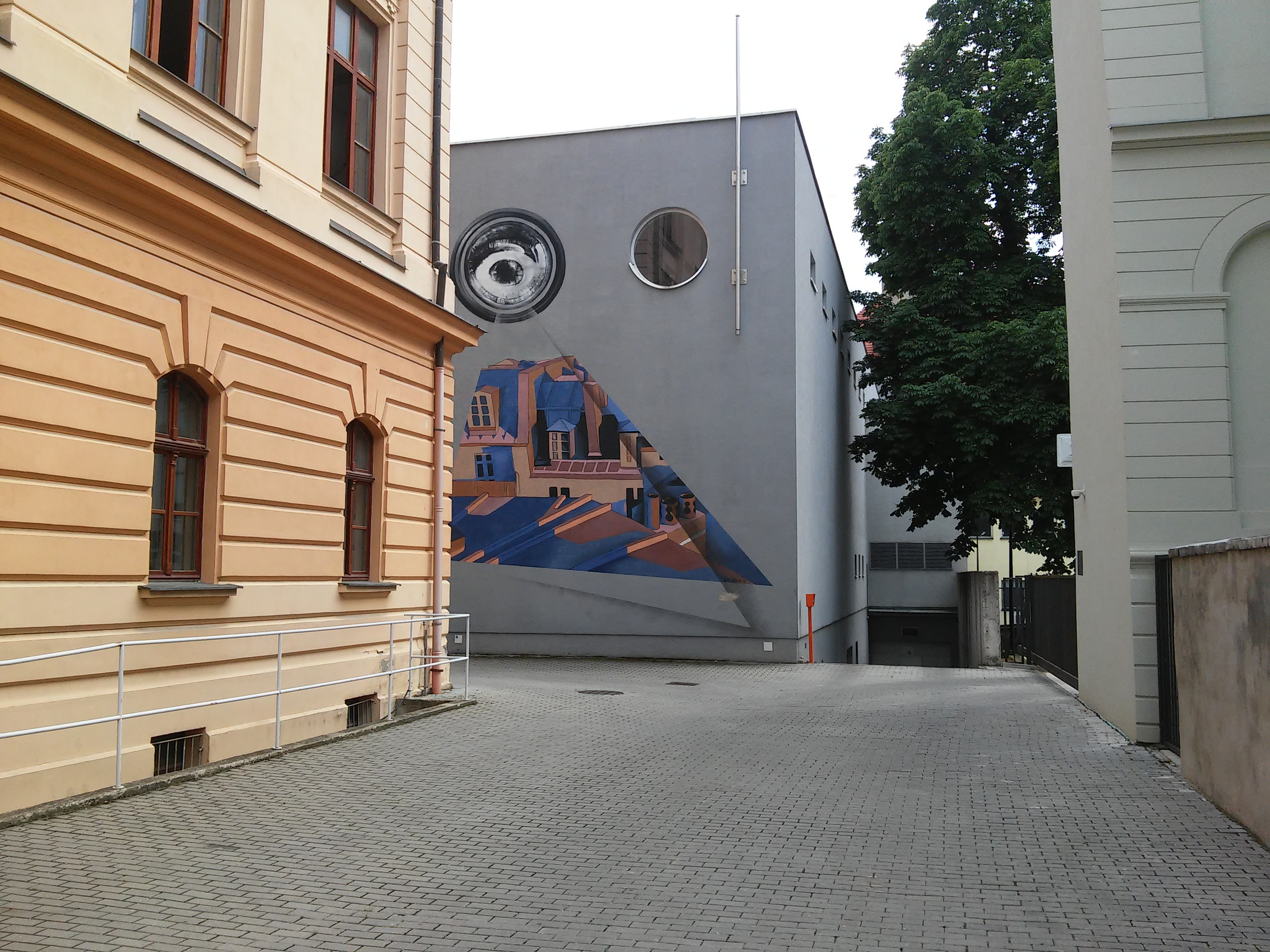 Zochova, Staré Mesto, Bratislava